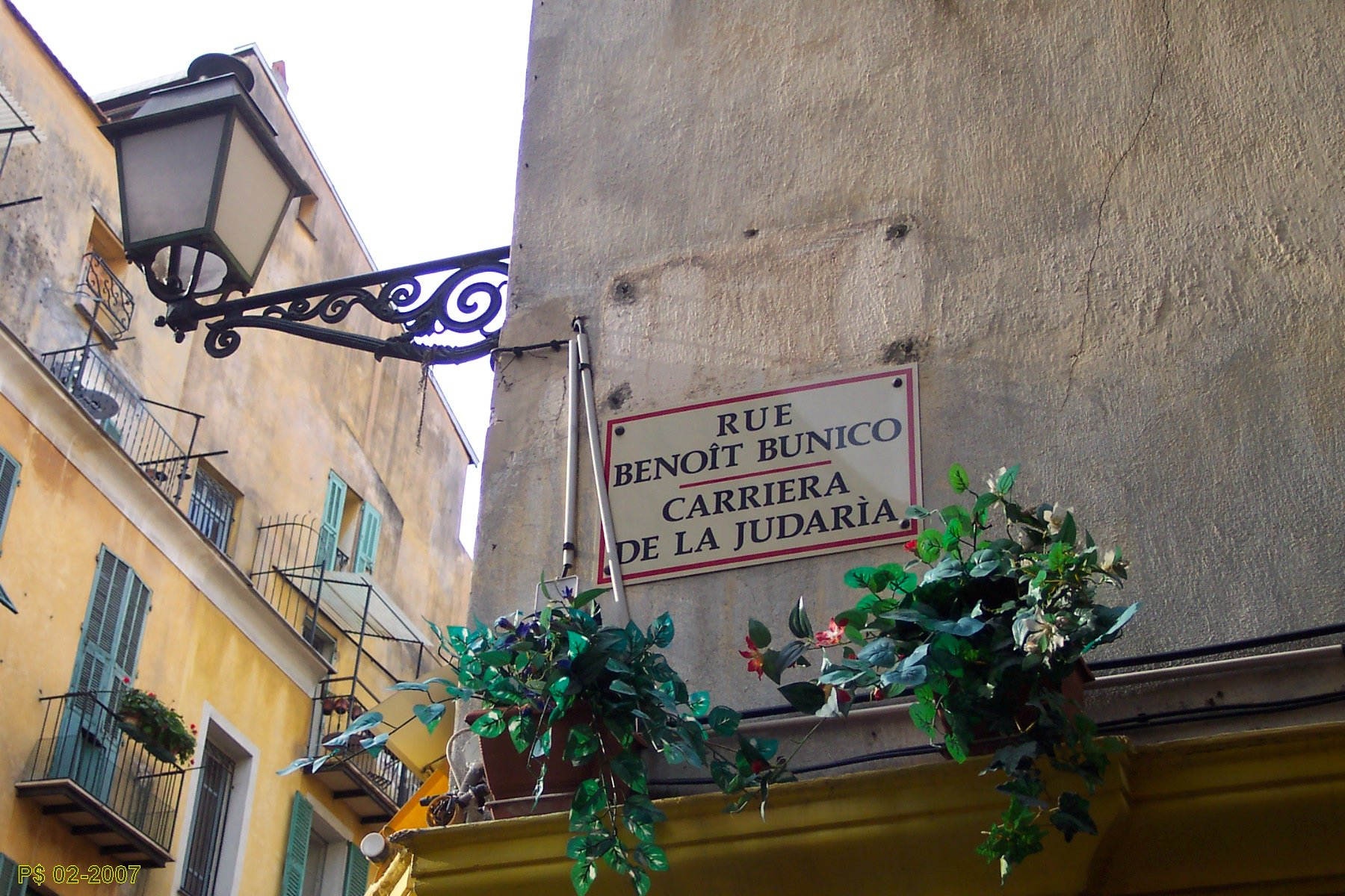 Nice-Carabacel Le dragon caché de la place Toselli